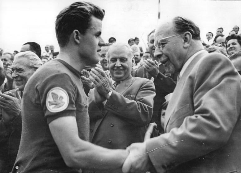 Friedensfahrt, Erich Hagen, Walter Ulbricht Zentralbild Kollektiv 16.5.1960 - XIII. Friedensfahrt 1960. 13. Etappe von Magdeburg nach Berlin am 16.5.1960 über 182 km. Durch Erich Hagen, der die letzte Etappe gewann, kommt der Gesamteinzelsieger aus der Mannschaft der DDR, die ihre bereits auf der 1. Etappe erkämpften blauen Trikots bis nach Berlin verteidigen und damit auch die Mannschaftswertung gewinnen konnten. UBz: Walter Ulbricht, Erster Sekretär des ZK der SED und Erster Stellvertreter des Vorsitzenden des Ministerrates der DDR, beglückwünscht Erich Hagen zu seinem Sieg auf der letzten Etappe von Magdeburg nach Berlin und seinem Gesamteinzelsieg bei der diesjährigen Friedensfahrt.